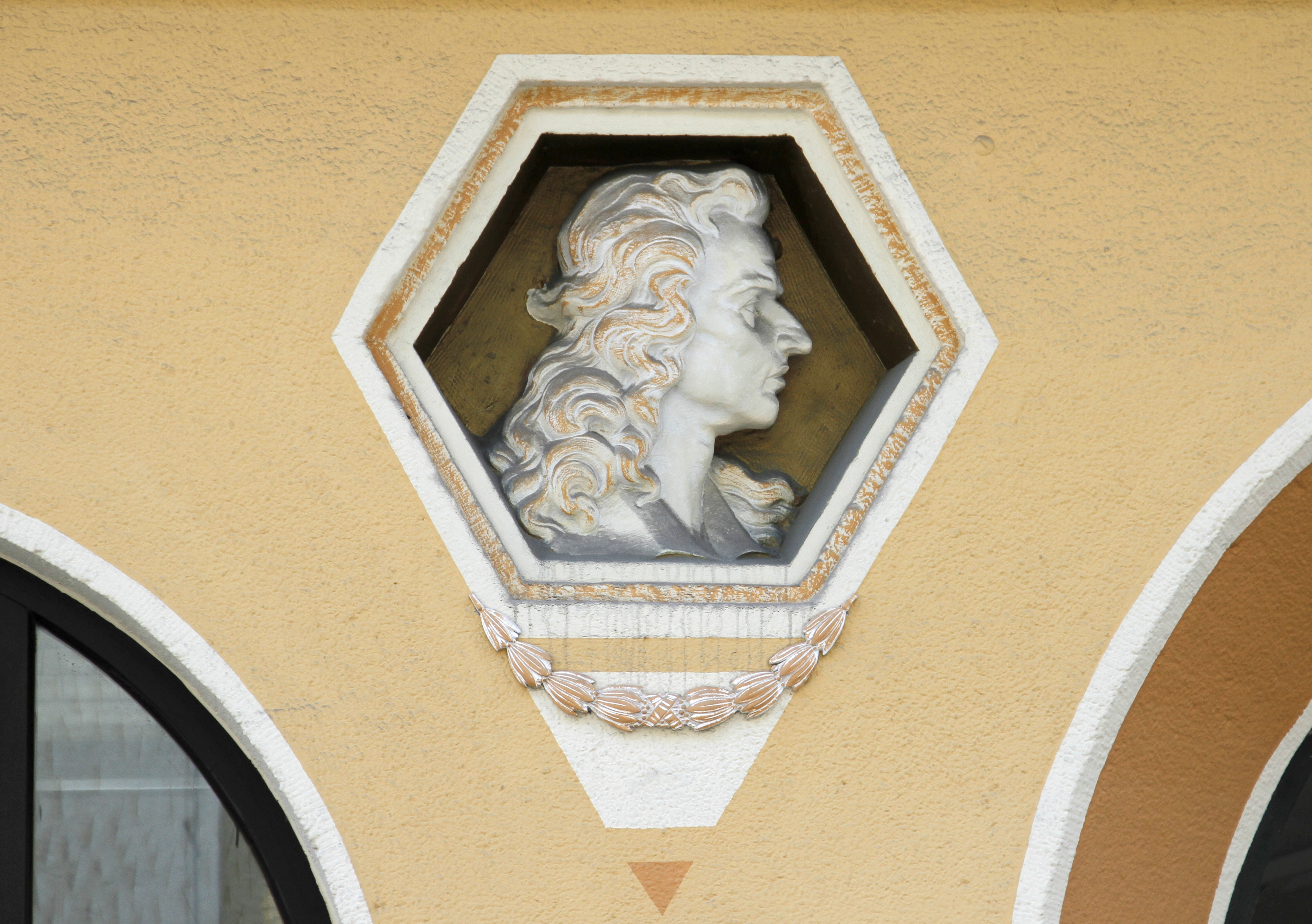 Schillerstraße 36, München. ehemaliges Kontorhaus, jetzt zum Hotel umgebaut. Büste von Friedrich Schiller in der Fassade.